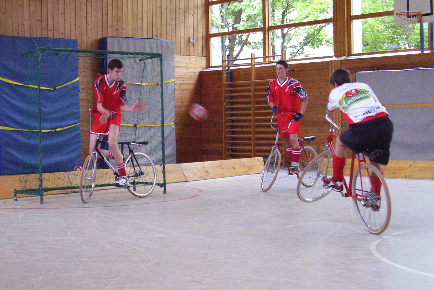 Radballszene: Strafschlag 4 Meter